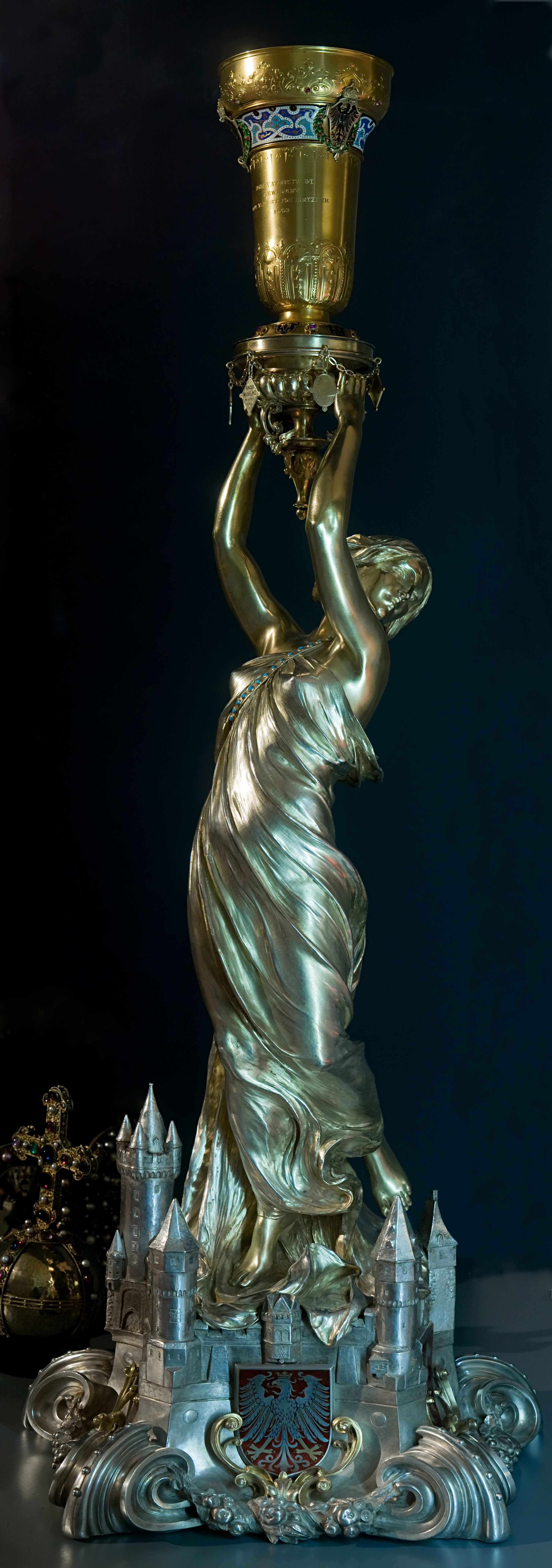 Historisches Museum Frankfurt am Main Kaiserbecher aus dem Jahr 1903 nach einem Entwurf Ferdinand Luthmers (1842–1921) Modellierung durch Friedrich Hausmann, Ausführung durch E. Schürmann & Co. teilweise vergoldetes Silber, Gold, Edelsteine, Emaille